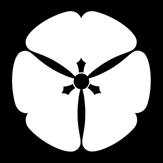 「村山片喰」紋（染抜）